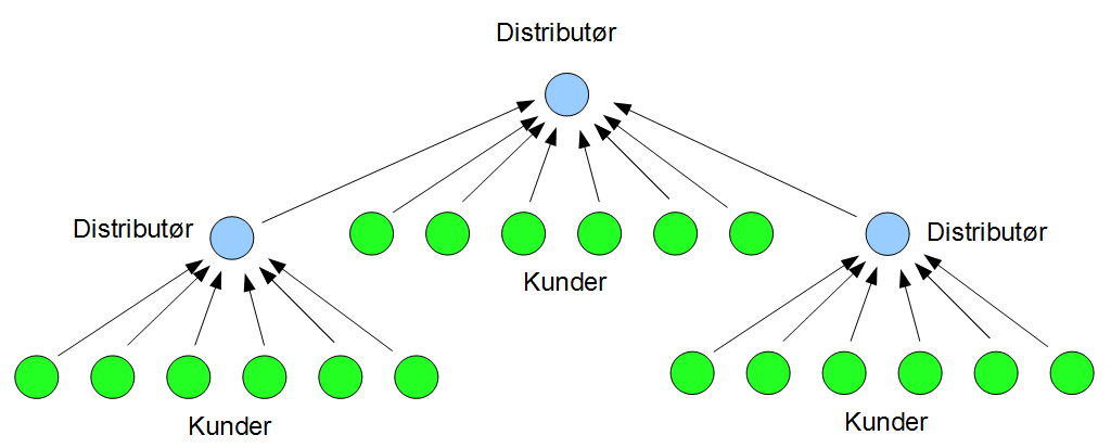 Grafisk presentasjon av hvordan distributører i flere nivåer kan tjene penger i et levedyktig MLM-konsept.